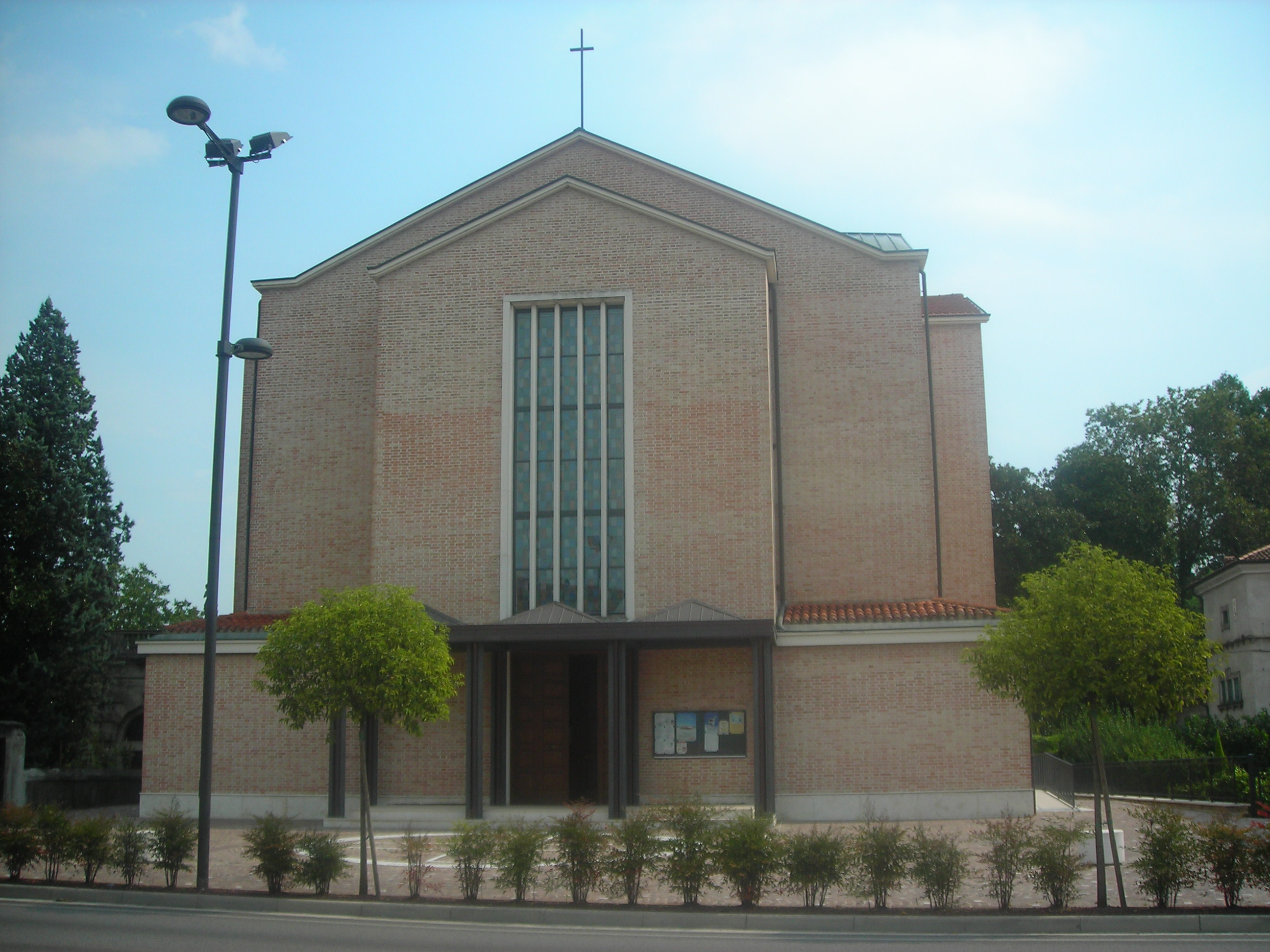 foto della Chiesa di San Cristoforo a Costabissara (Vicenza)